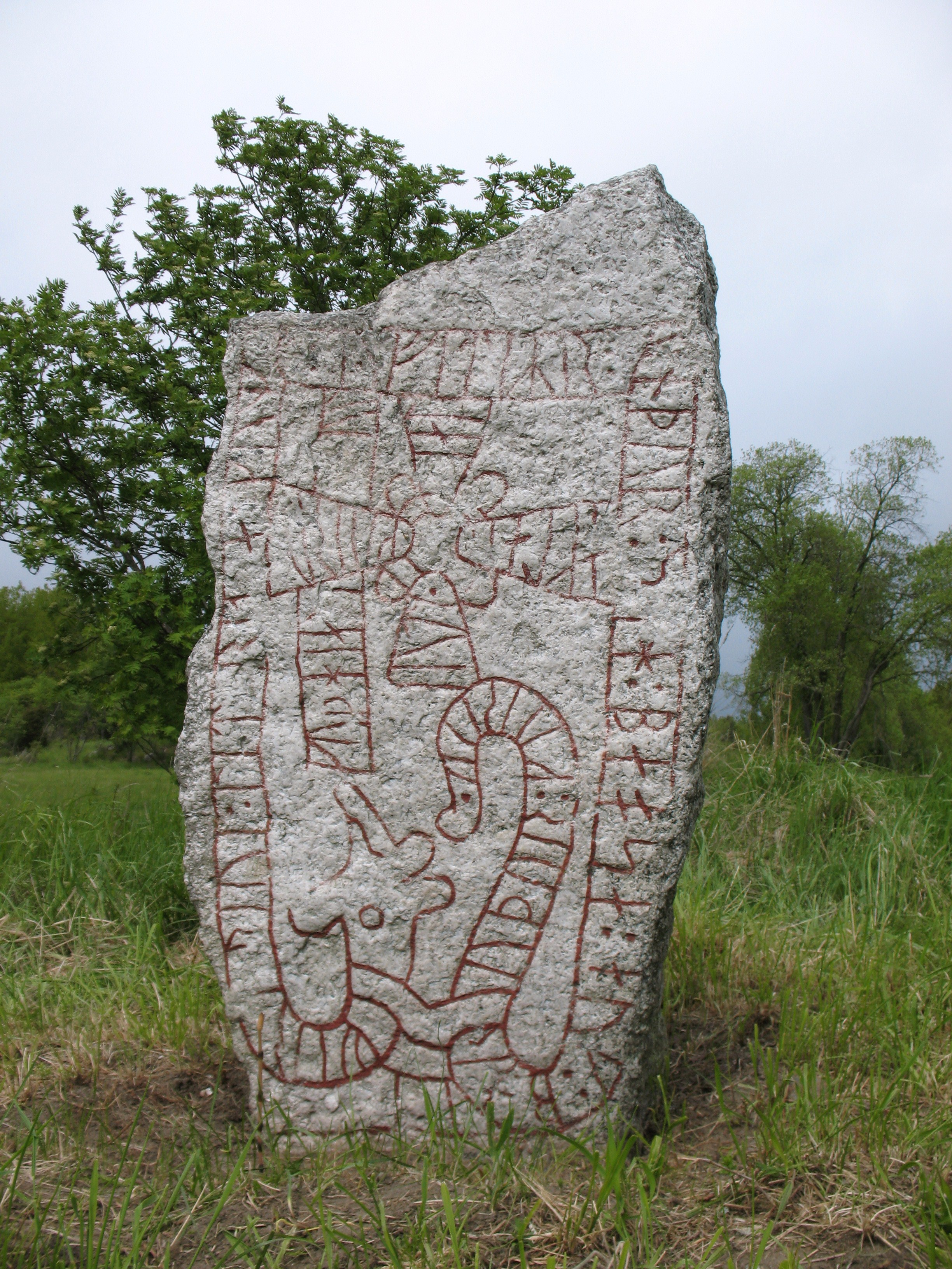 Runestone